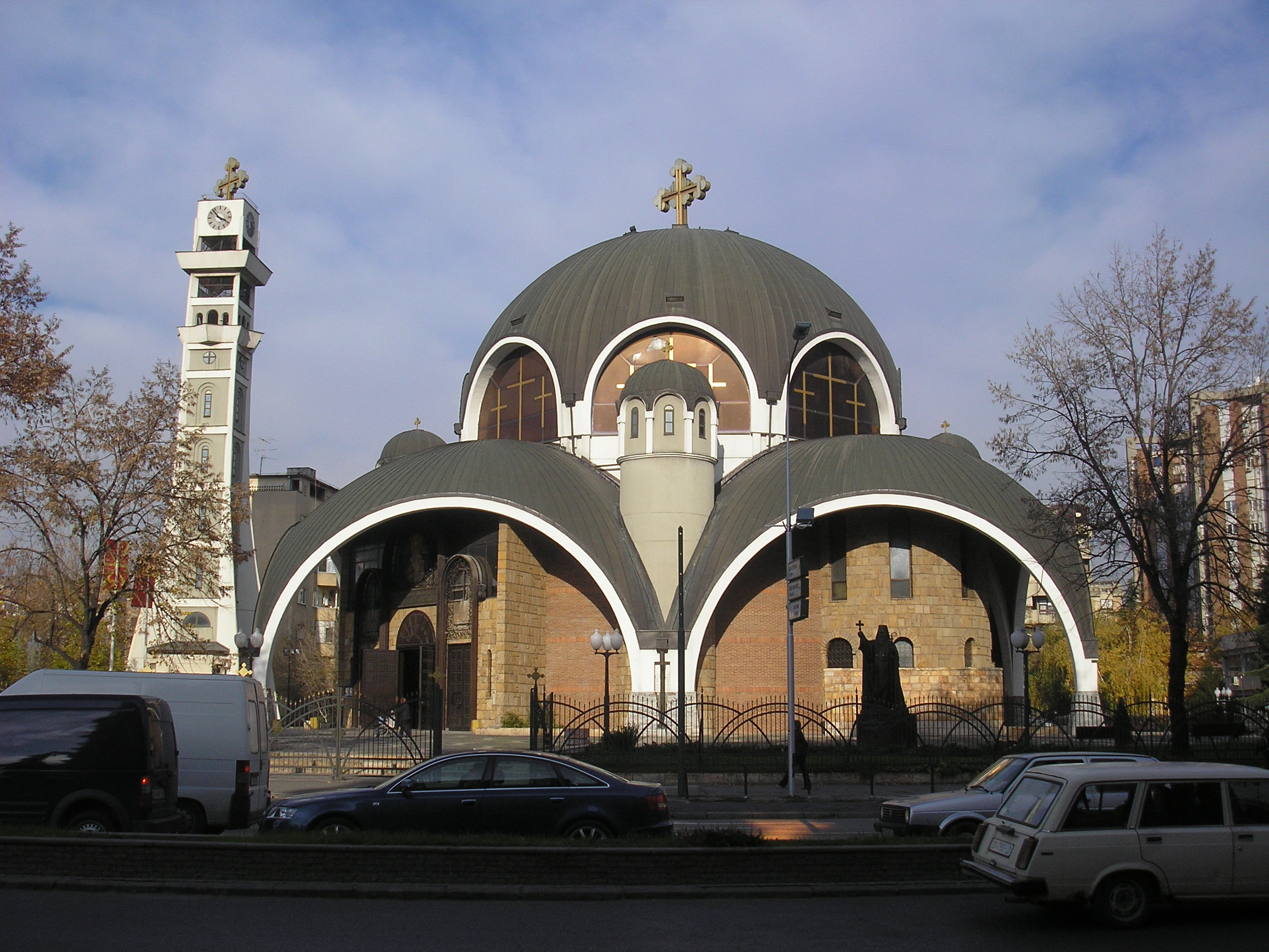 Катедралата Свети Климент в Скопие, Република Македония.